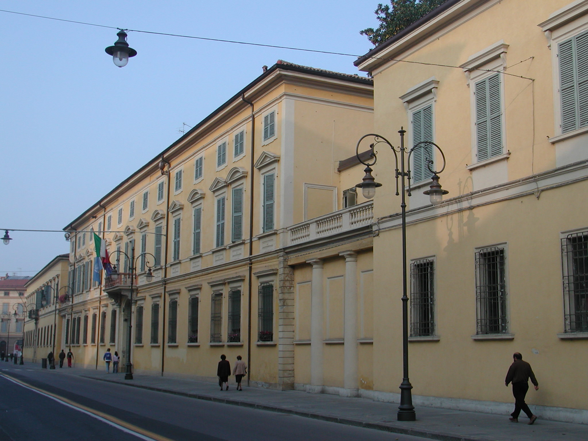 palazzo ducale, Reggio Emilia author:Paolo da Reggio